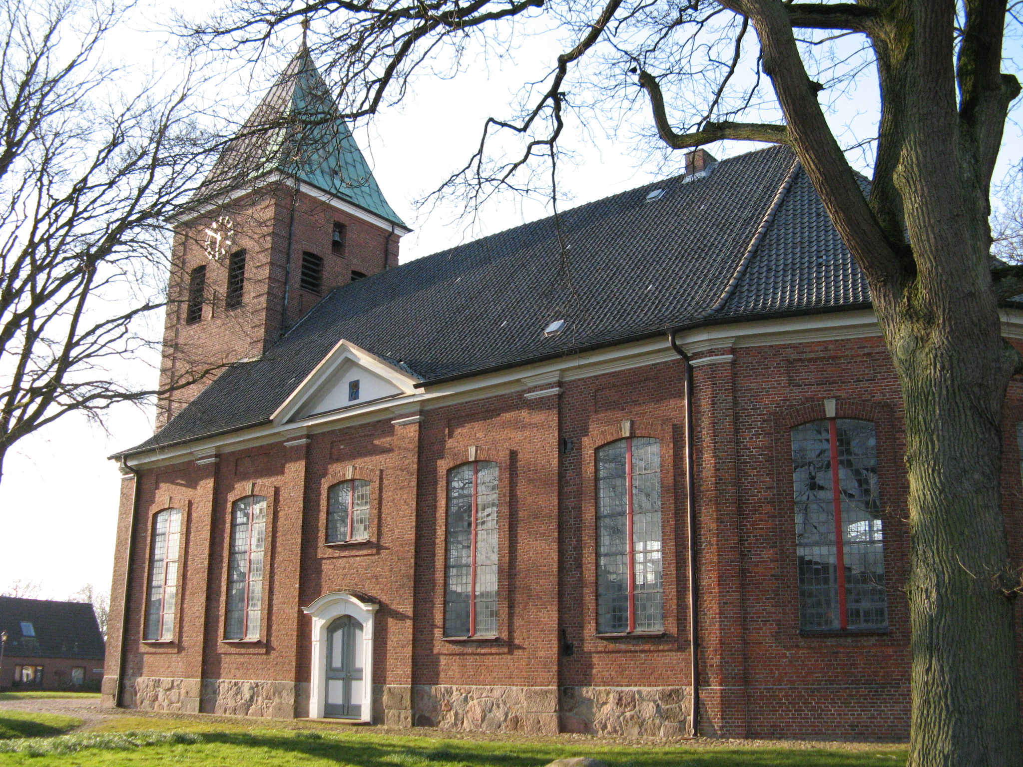 St. Nicolai-Kirche Wöhrden St. Nicolai church Wöhrden